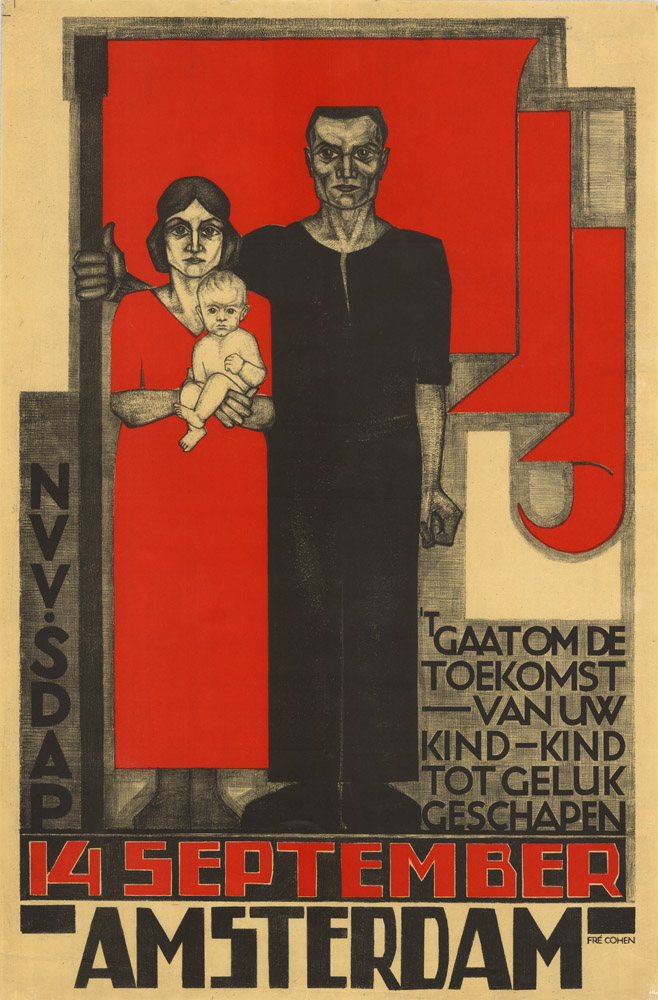 't gaat om de toekomst van uw kind kind tot geluk geschapen. 14 september, Amsterdam Fre Cohen, 1930 NVV SDAP